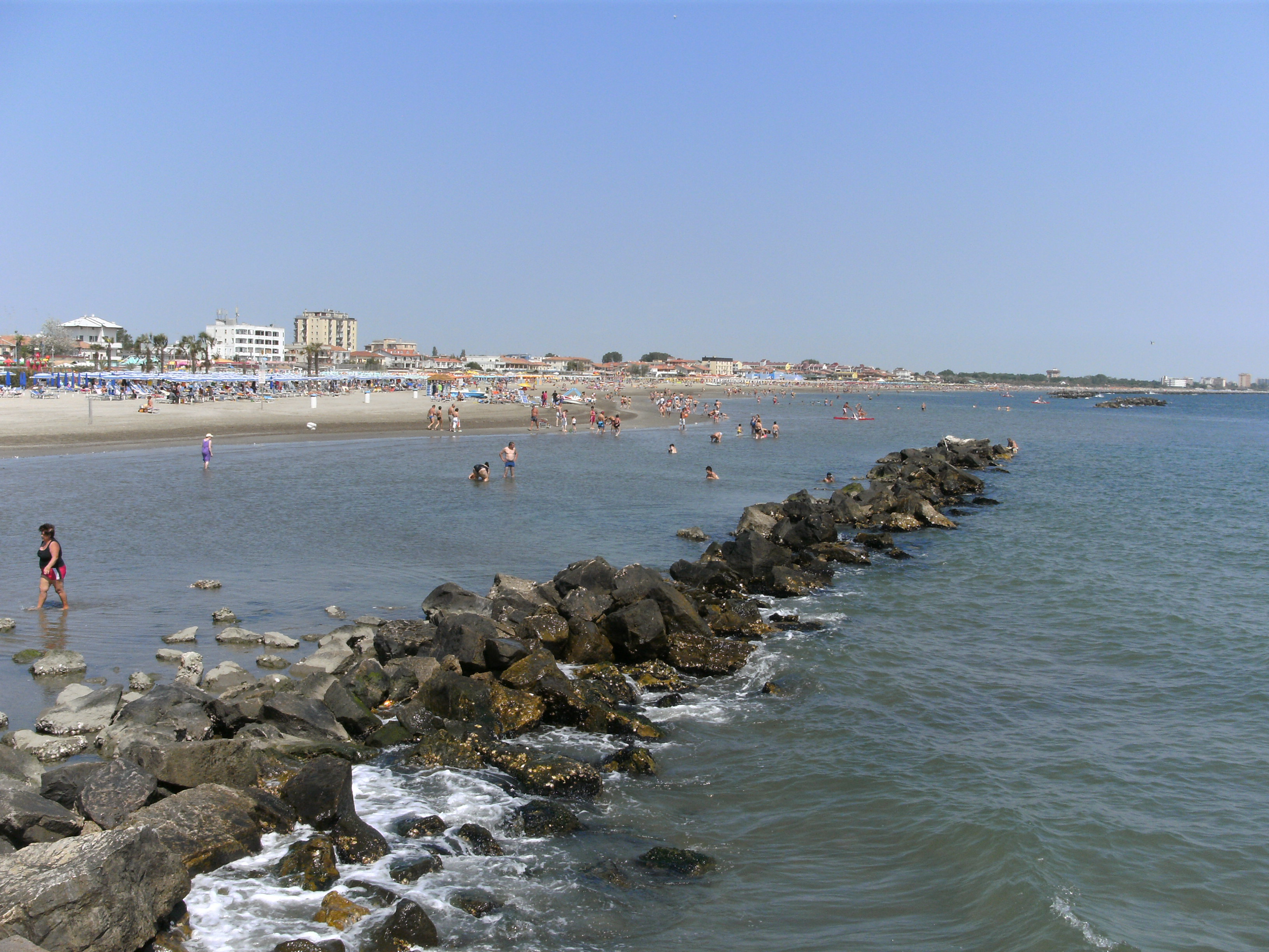 Porto Garibaldi (Comacchio, FE), Strandpartie von der Moöe der Hafeneinfahrt aus gesehen